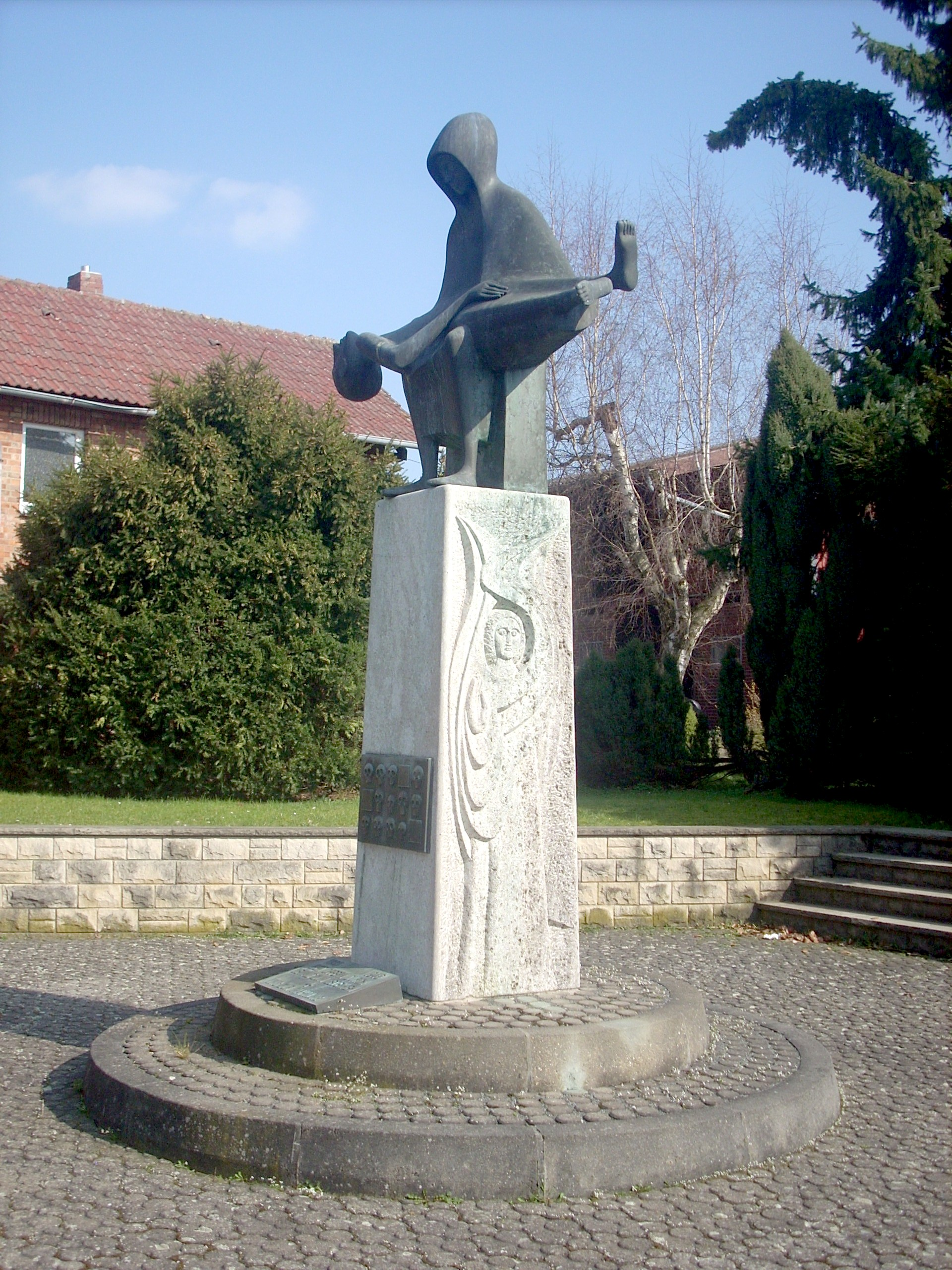 Algermissen, Ehrenmal für die Opfer der Weltkriege (Hanns Joachim Klug)